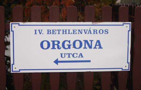 Kecskeméti utcanévtábla a kerület jelzésével (Orgona utca)